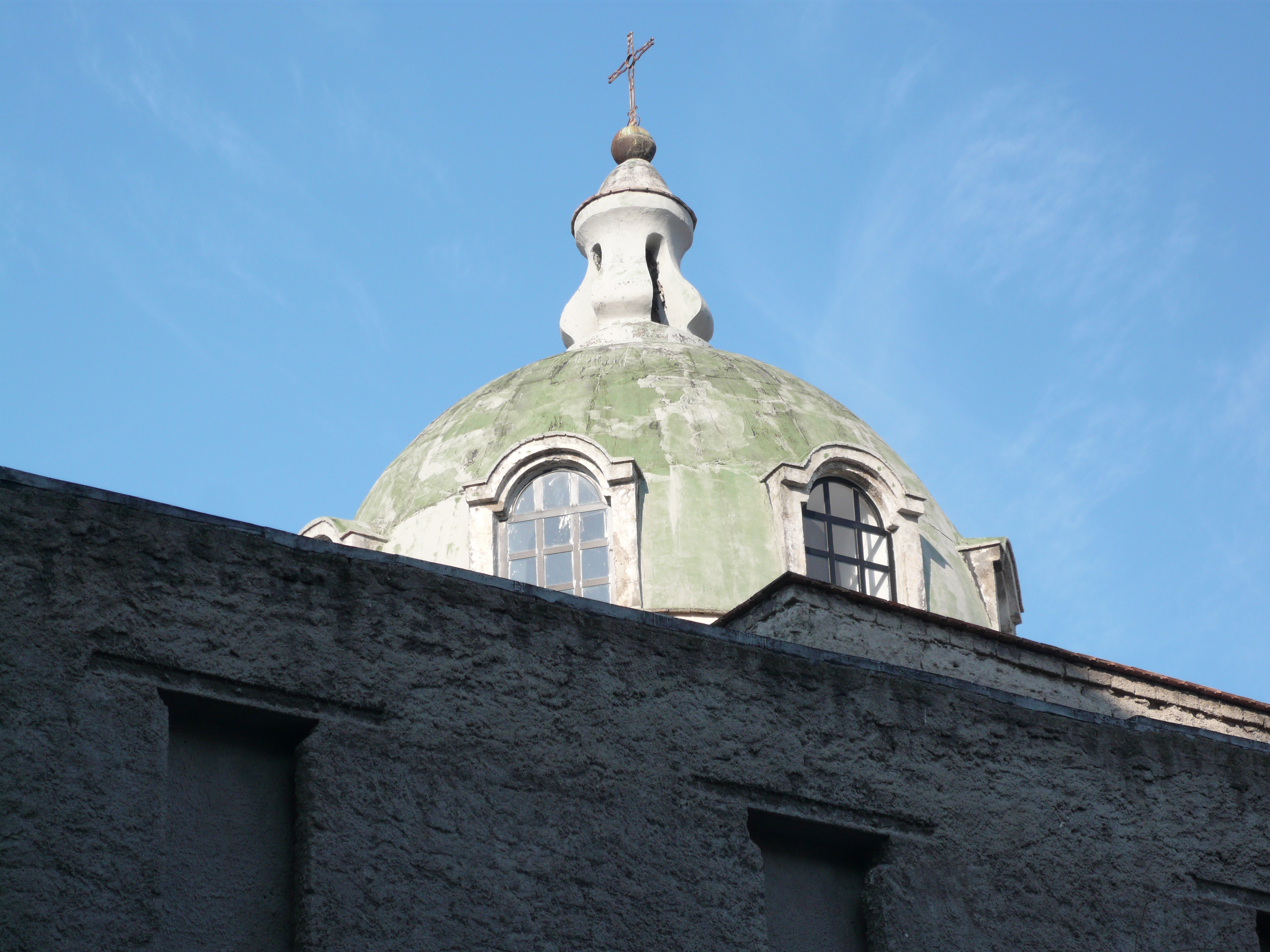 Chiesa dei Santi Bernardo e Margherita a Fonseca-cupola